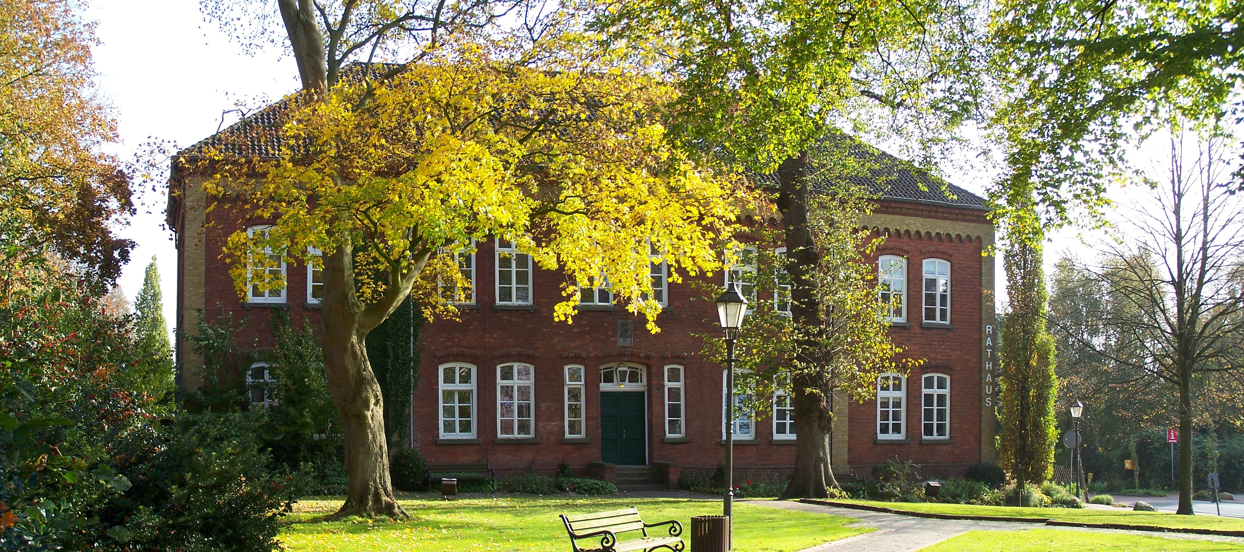 Das Rathaus in Weener.